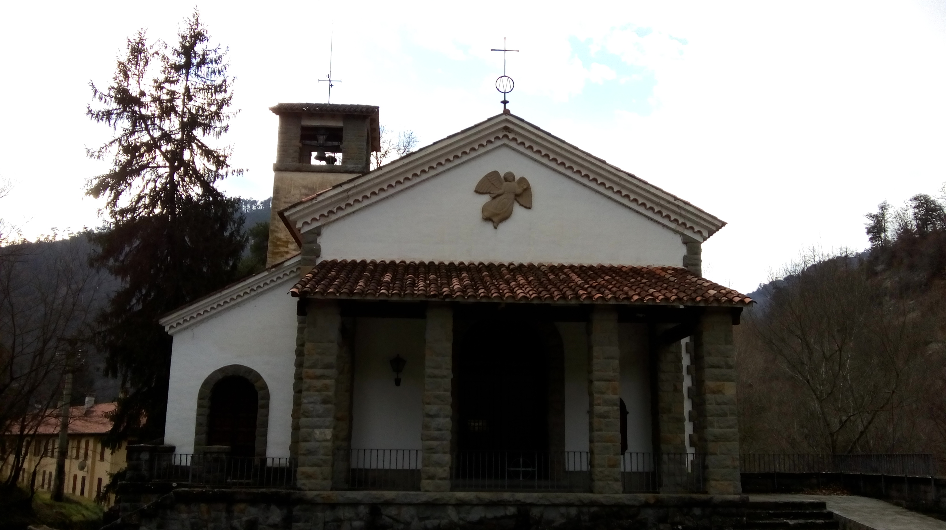 Iglesia de La Farga de Bebié